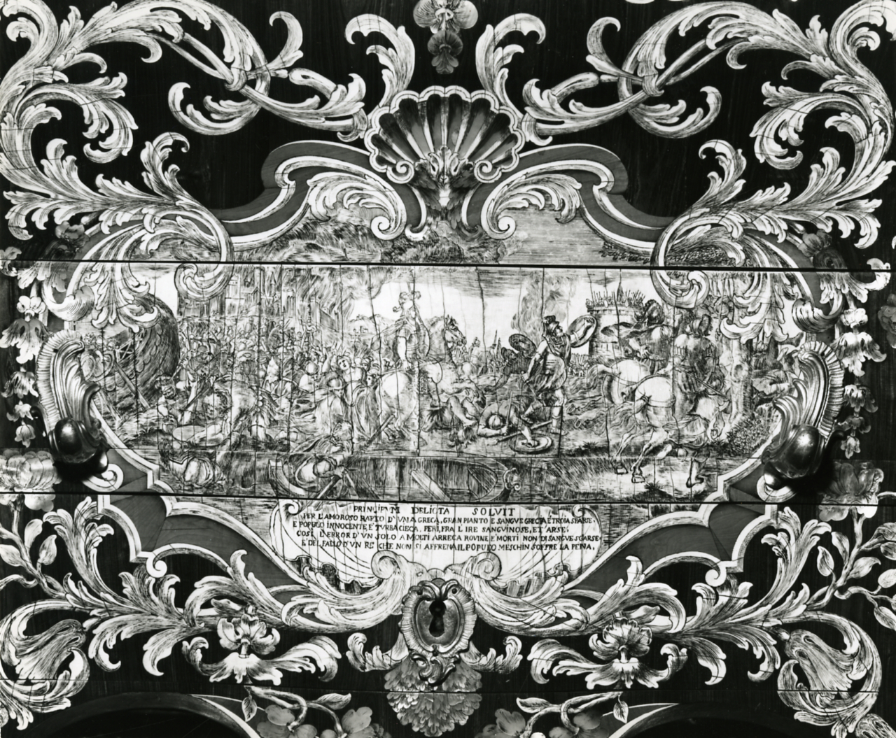 Roma. Palazzo del Quirinale. Pietro Piffetti, Mobili in legno, sec. XVIII, particolari dipinti. Secretaire, sec. XVII, mobilein legno, parte media laterale destro, particolare dipinto. Servizio fotografico : Roma, 1962 / Paolo Monti. - Stampe: 3 : Positivo b/n, gelatina bromuro d'argento/ carta, 24x30. - ((Al verso delle stampe manoscritti i numeri dei negativi corrispondenti: 44631, 44638, 44644; iscrizioni didascaliche manoscritte a matita; timbro a inchiostro con copyright (Corso Sempione - Milano). - Sul coperchio della scatola iscrizione didascalica manoscritta a pennarello nero: "Pittura". - Occasione: Documentazione del Palazzo del Quirinale per la Signora Chiara Briganti. - Fonte: Agenda di Paolo Monti: Foto Leica 1 / 1-51 verde, 1-110 nera (1958-1963), presso Archivio Paolo Monti. - Fonte: Fogli pinzati di Paolo Monti: I. Carteggi/ Quirinale (1962), presso Archivio Paolo Monti. Elenco dattiloscritto dettagliato delle opere d'arte riprodotte suddiviso per tipologia e autore; elenco dettagliato delle riprese effettuate con soggetto e numero di inventario suddiviso per macrocategorie di soggetti. - Fonte: Rubrica di Paolo Monti: Archivio fino 1-4-1961/ 31-3-1963 (1961-1963), presso Archivio Paolo Monti